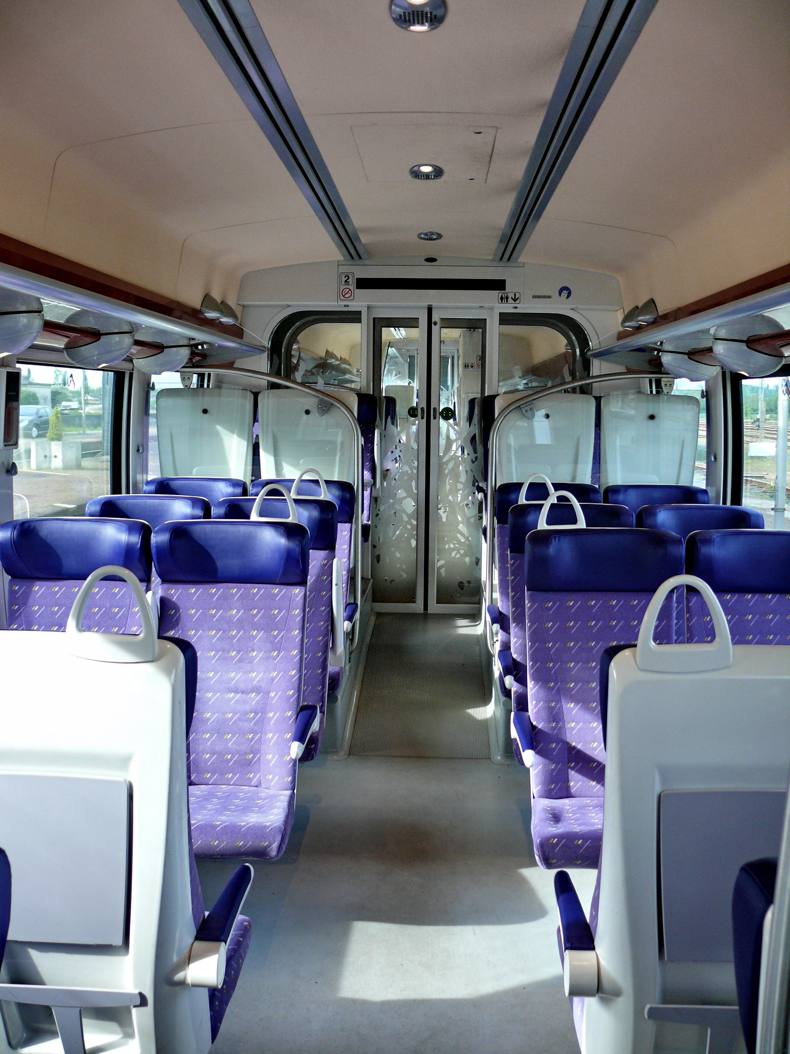 Intérieur de la caisse centrale de l'automotrice SNCF Z 27632 (série Z 27500) de la Région Picardie